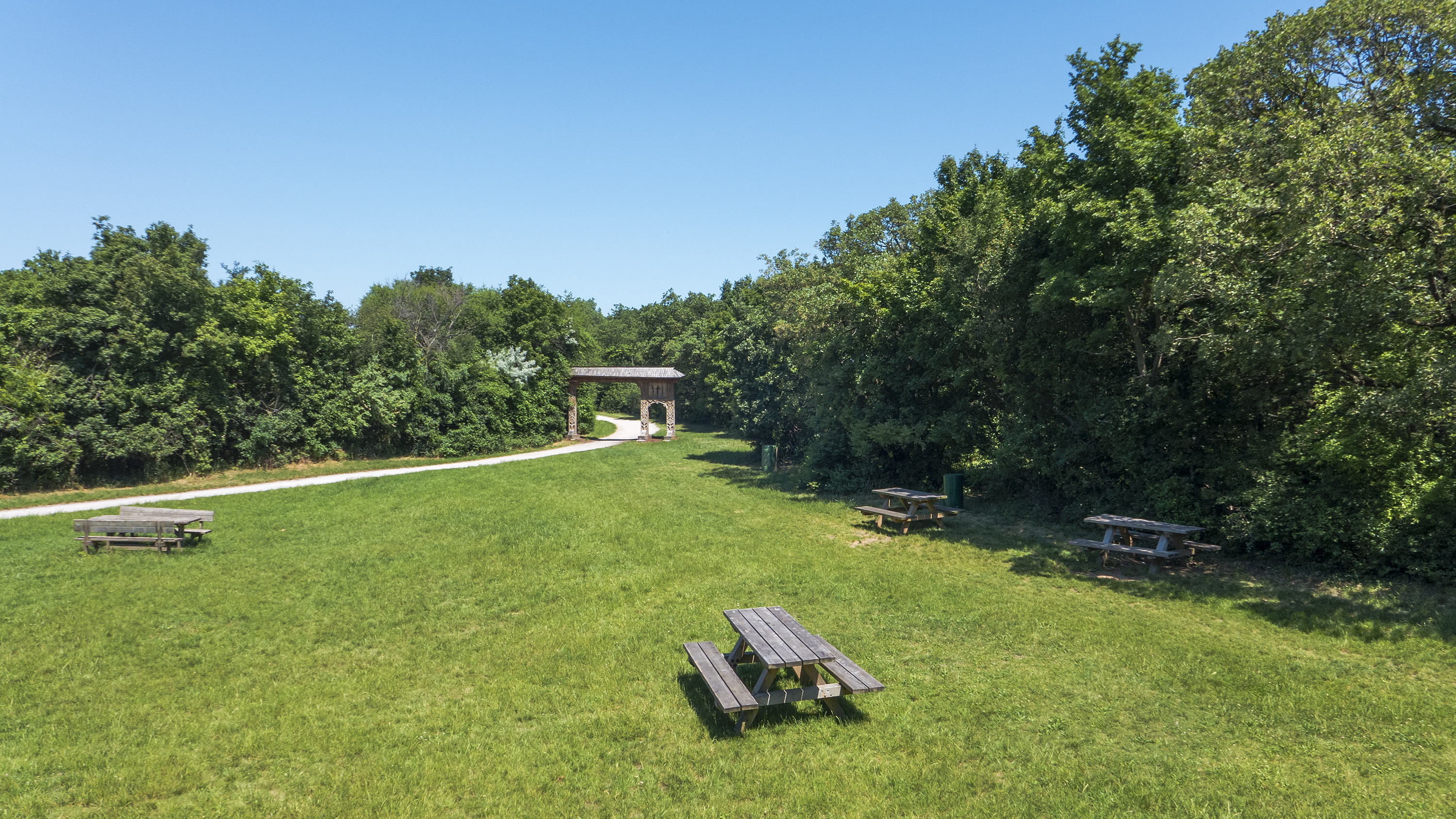 Laaer Wald in Wien 10